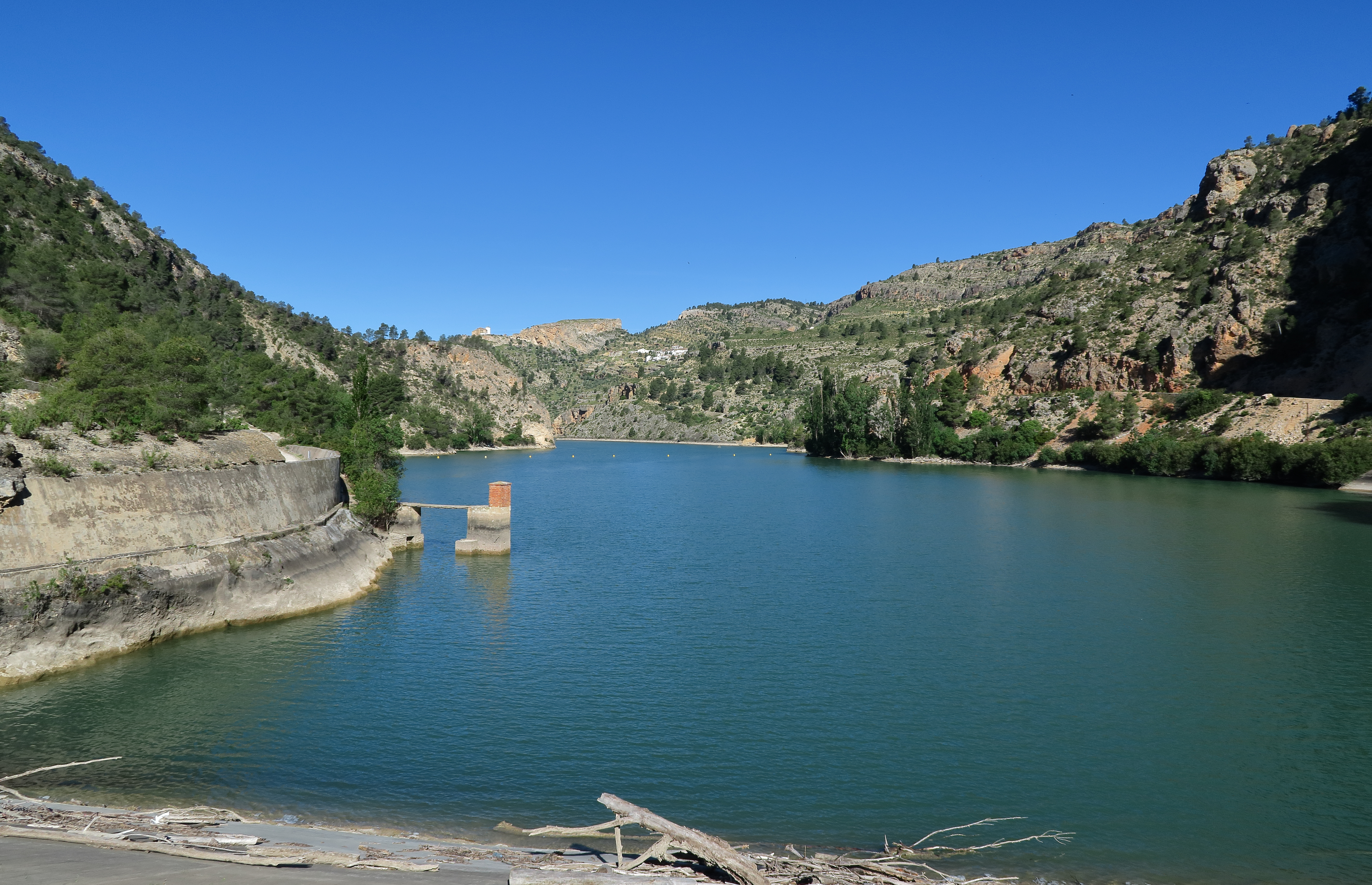 Embalse del Molinar, Ermita y Barrio del Santuario, 01 This is a photography of a Special Area of Conservation in Spain with the ID: ES4210001. Natura2000 entry, EEA entry